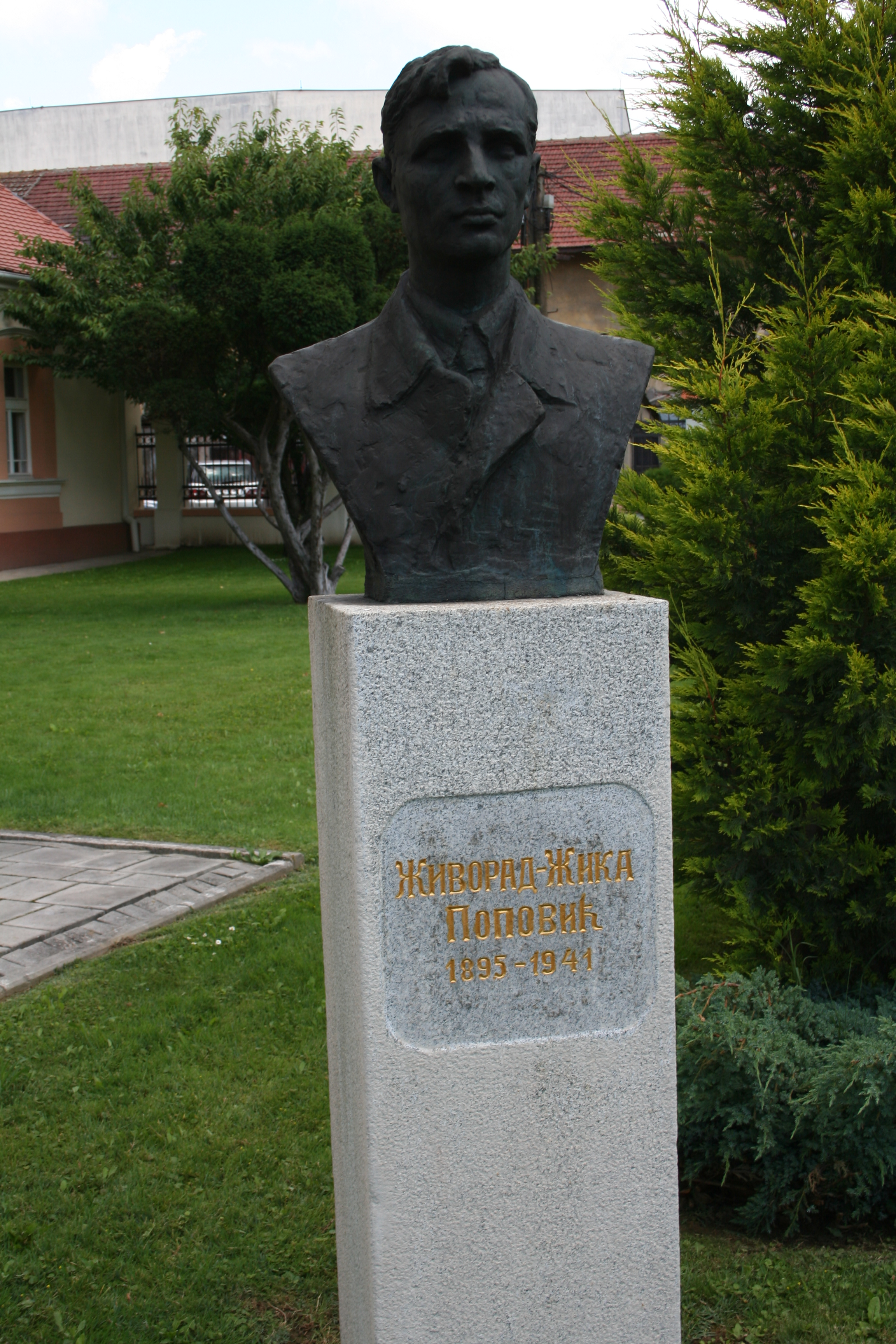 Spomenik Žiki Popoviću u dvorištu biblioteke